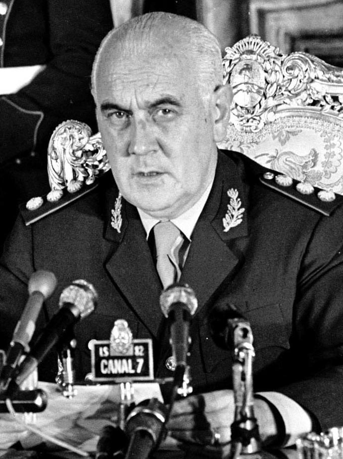 Es una foto del presidente de facto Alejandro Lanusse, durante una conferencia de presa.